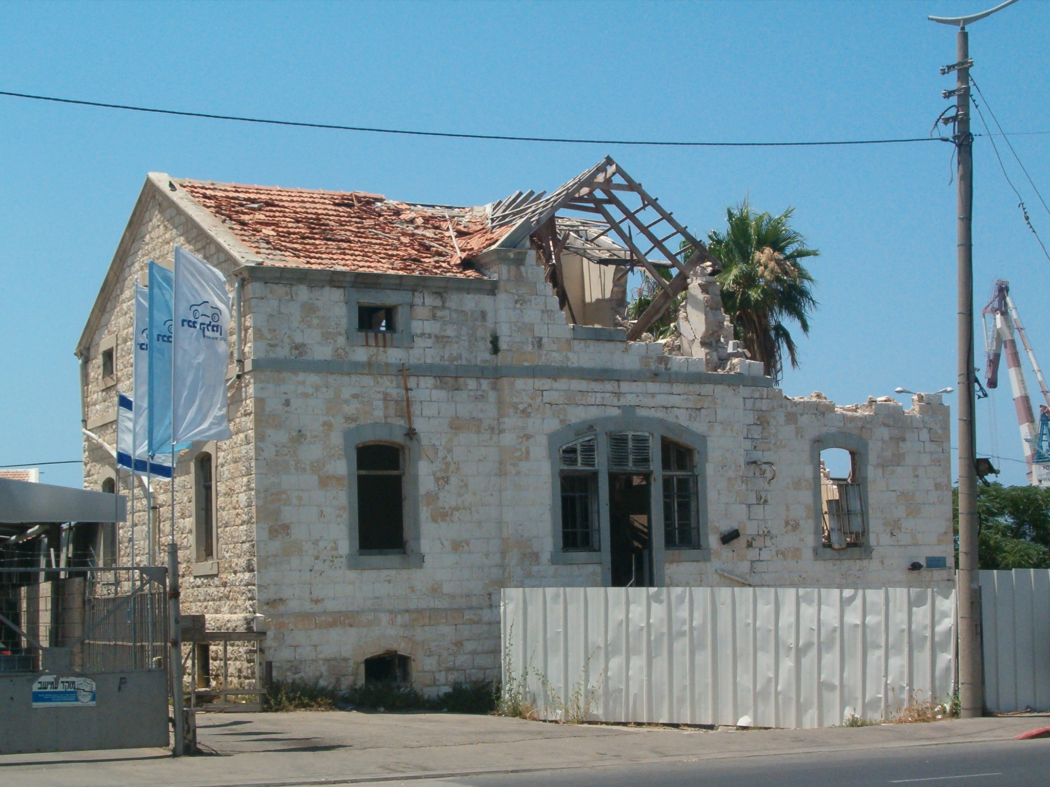 מבנה לשימור במושבה הגרמנית חיפה שנפגע על ידי טיל במלחמת לבנון השנייה